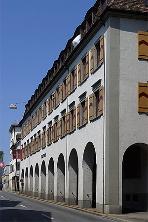 Stadthaus in Arbon